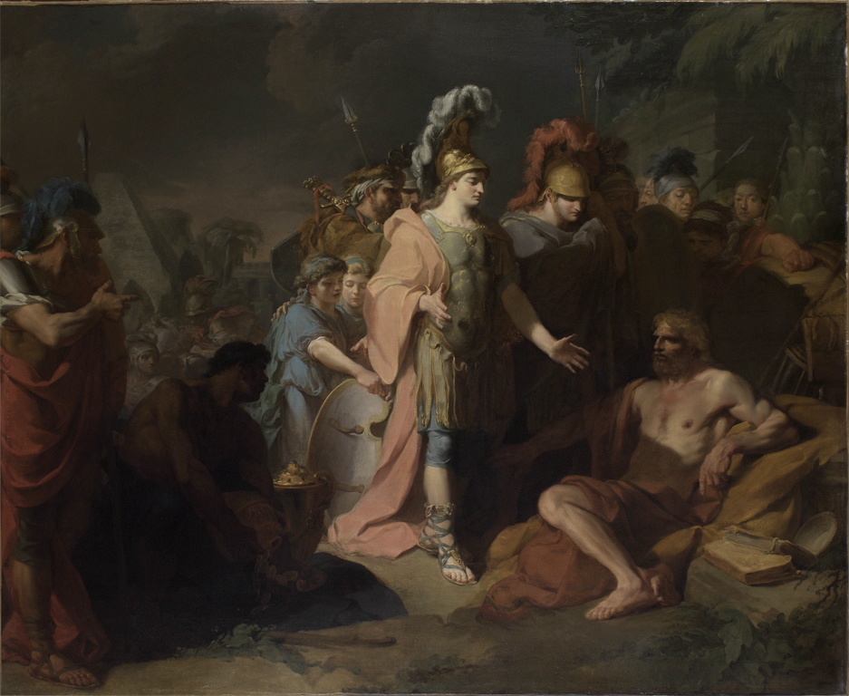 Alexandre et Diogène orDiogène Visité par Alexandre